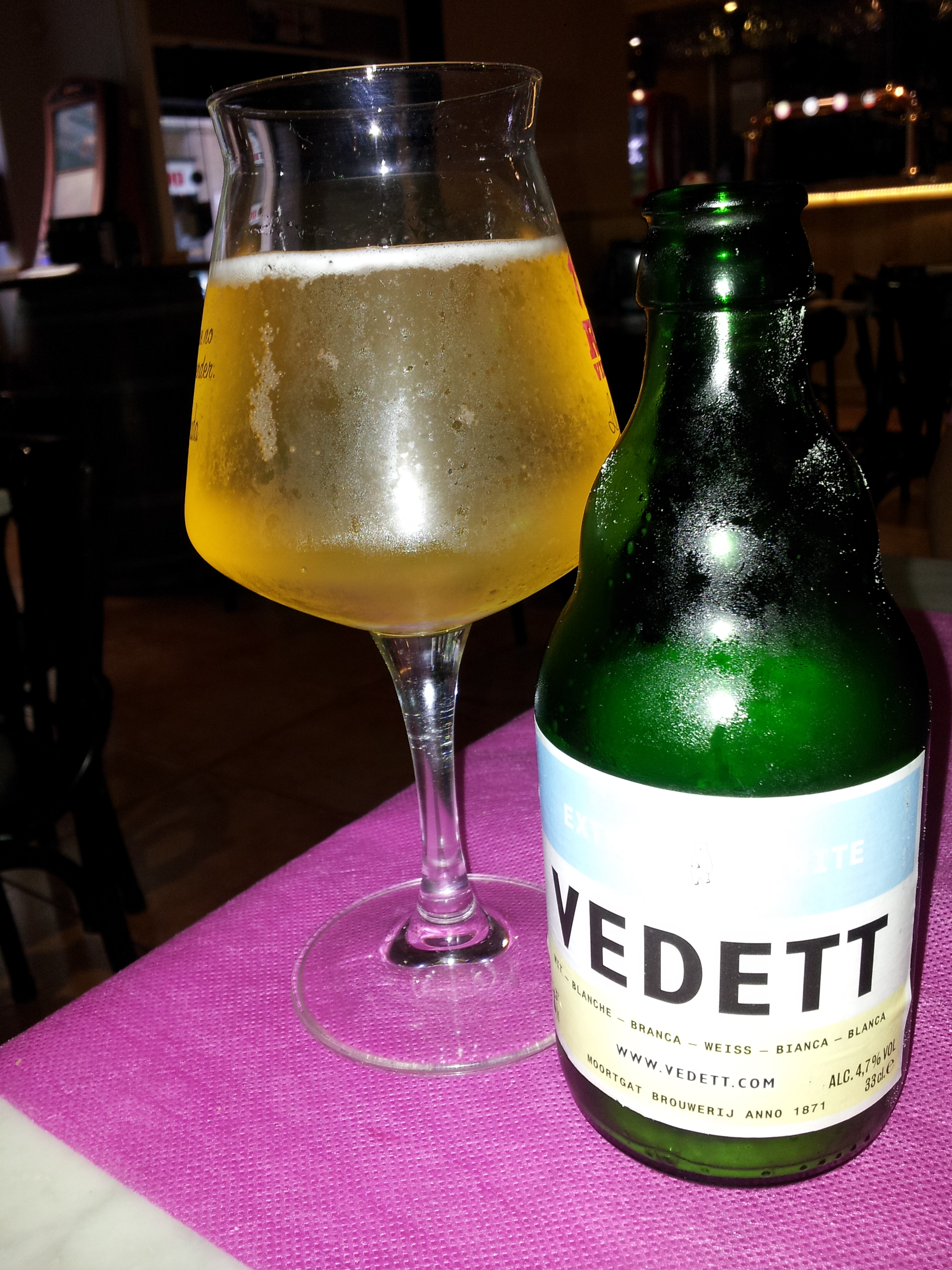 De la casa Moortgat (Duvel).